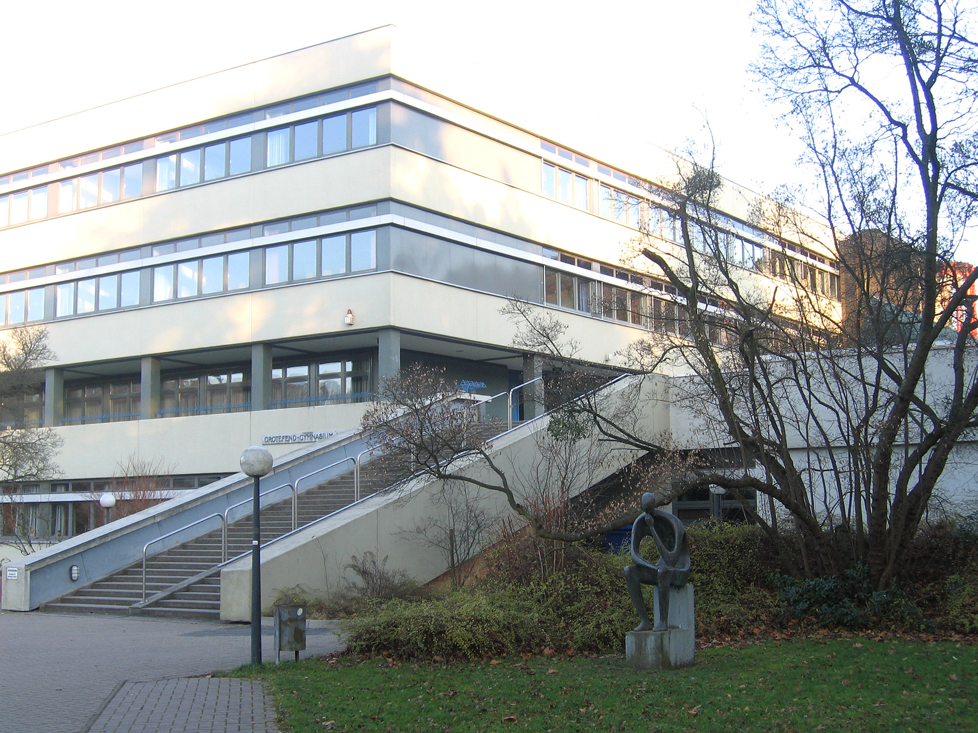 Grotefend-Gymnasium Münden, Germany, 2006-12-27